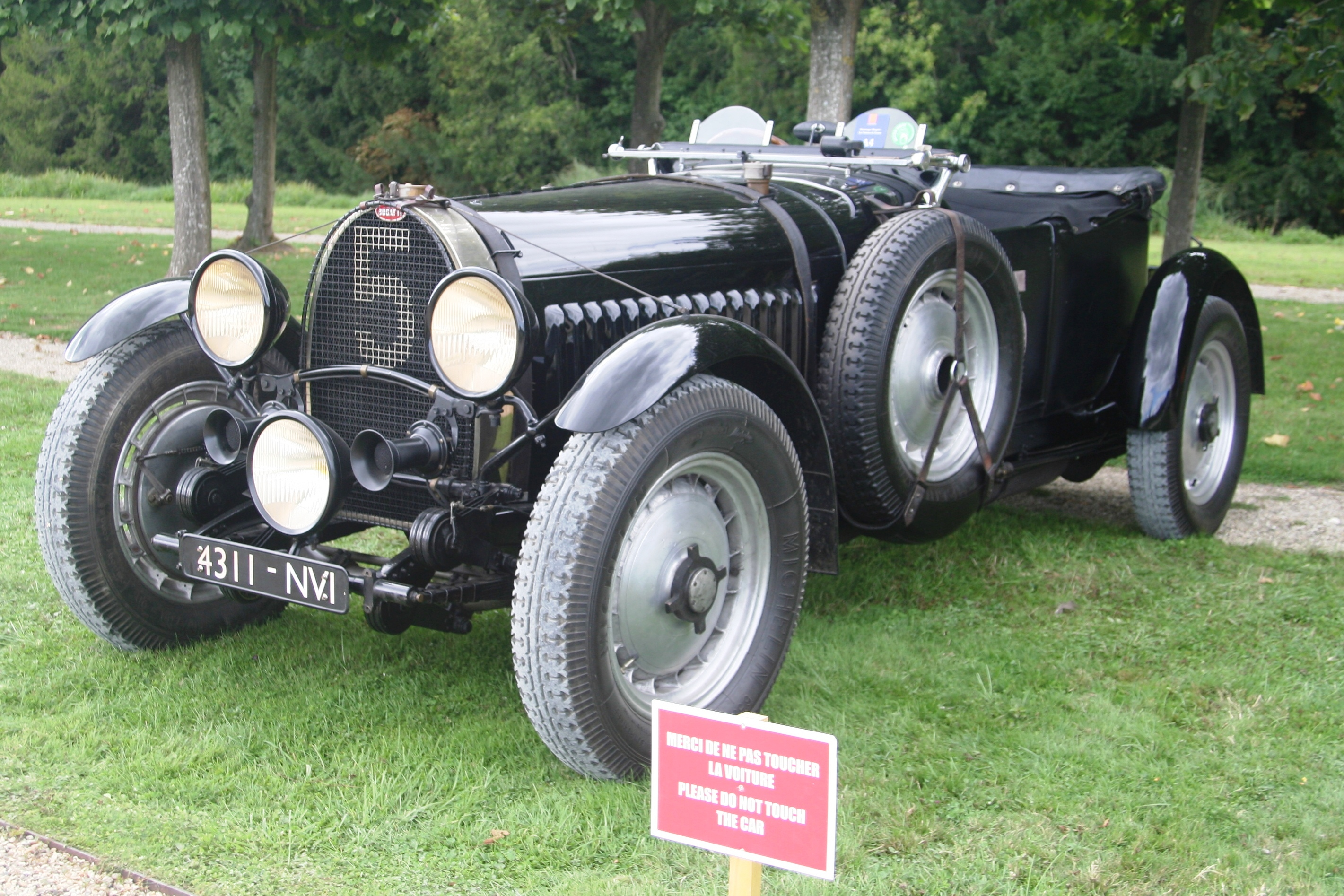 Chantilly Arts & Elegance Richard Mille 2015